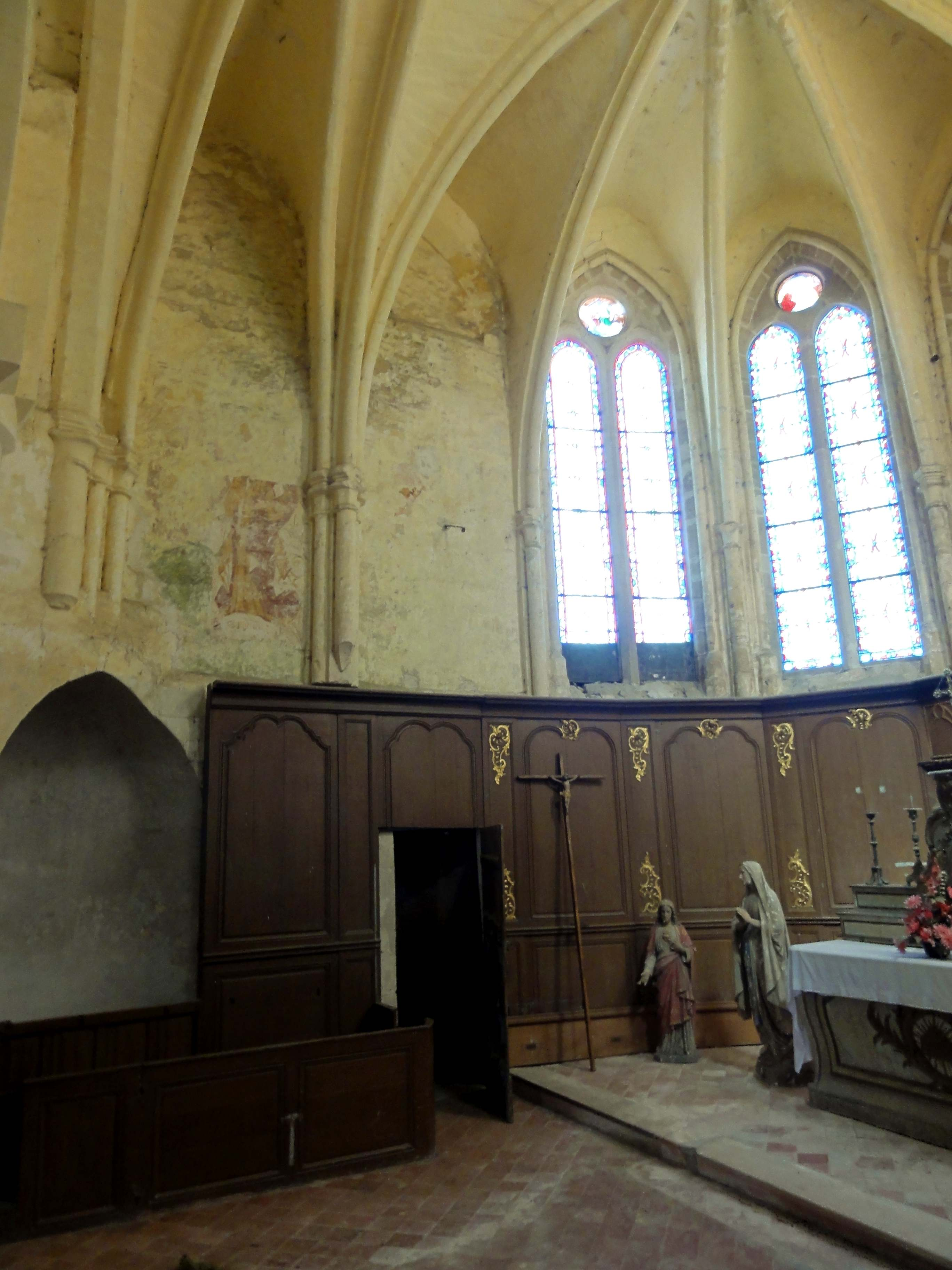 Intérieur de l'église (voir titre).